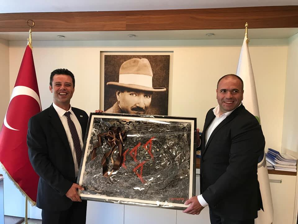 Фотографија од посетата на кумановскиот градоначалник на општина Чорлу, Р. Турција